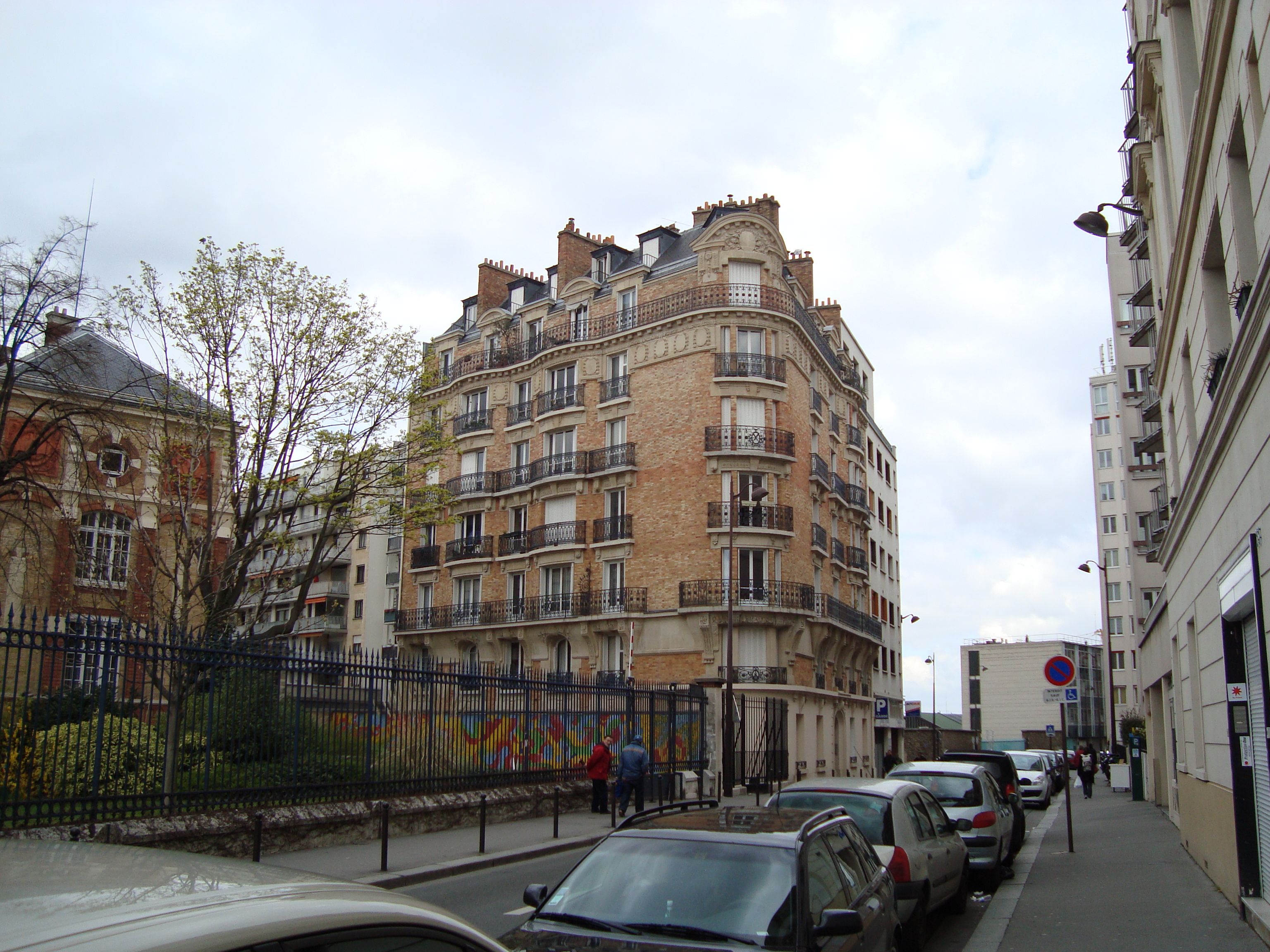 Rue Abel-Hovelacque située dans le 13 arrondissement de Paris